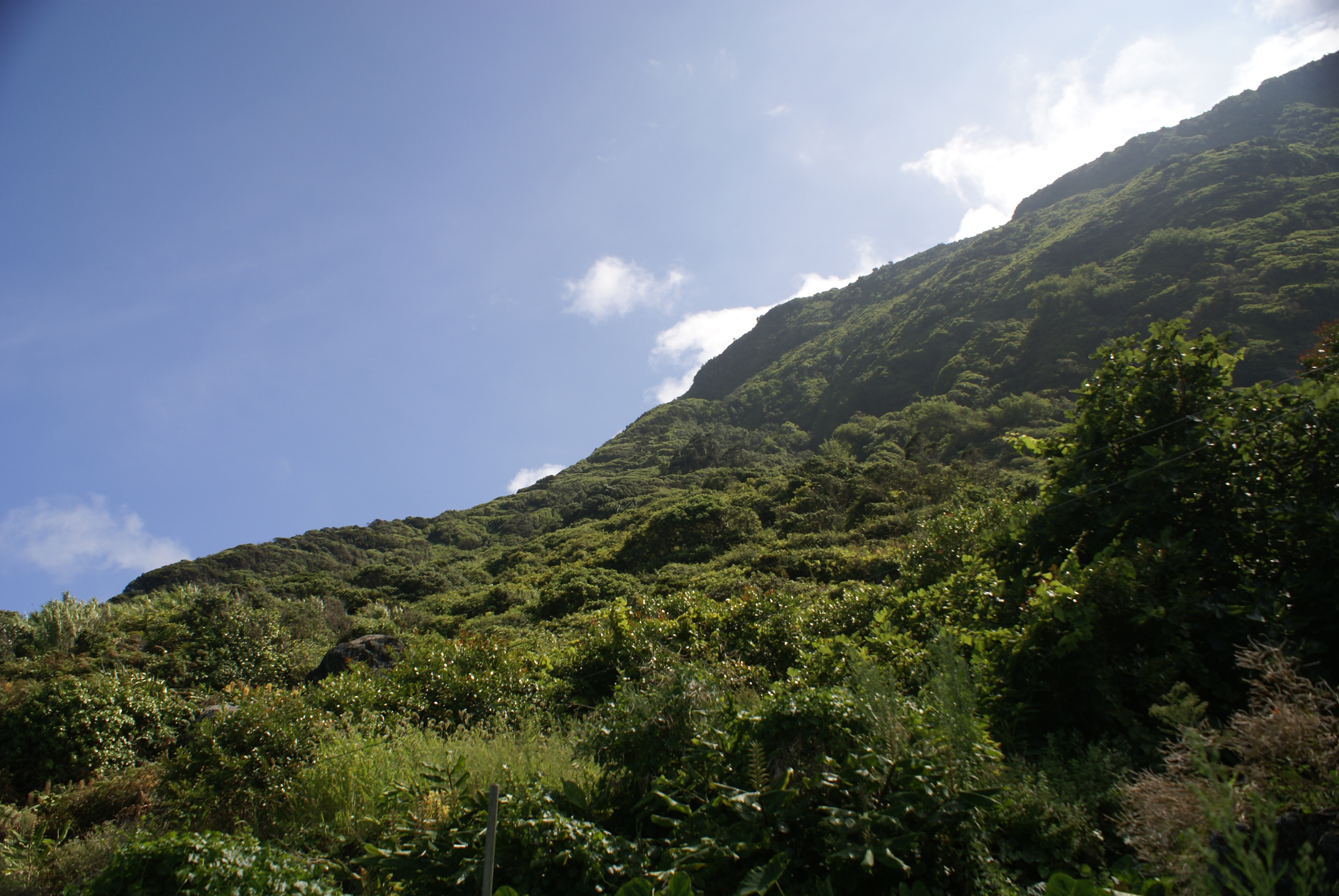 Fajã de Vasco Martins, paisagem da floresta de endémicas da Laurissilva típicas da flor da Macaronésia, Velas, ilhas de São Jorge, Açores